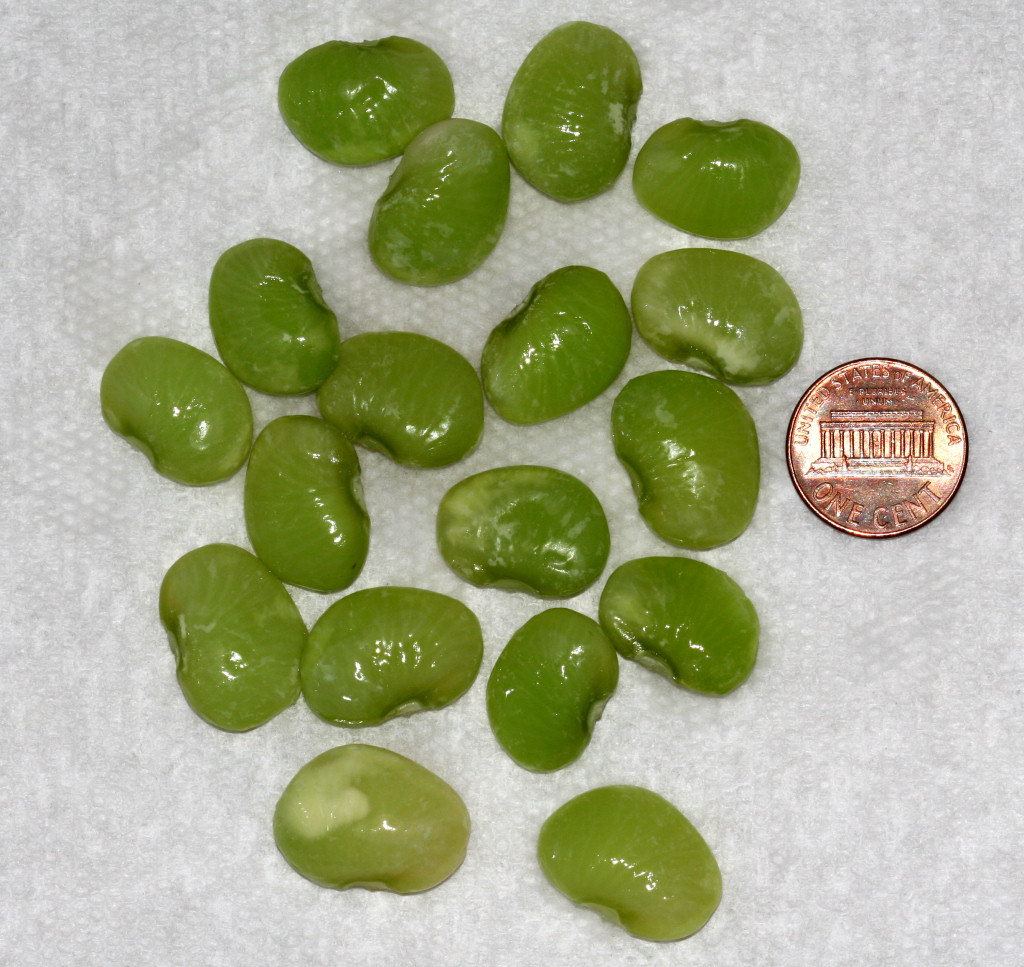 Lima Beans